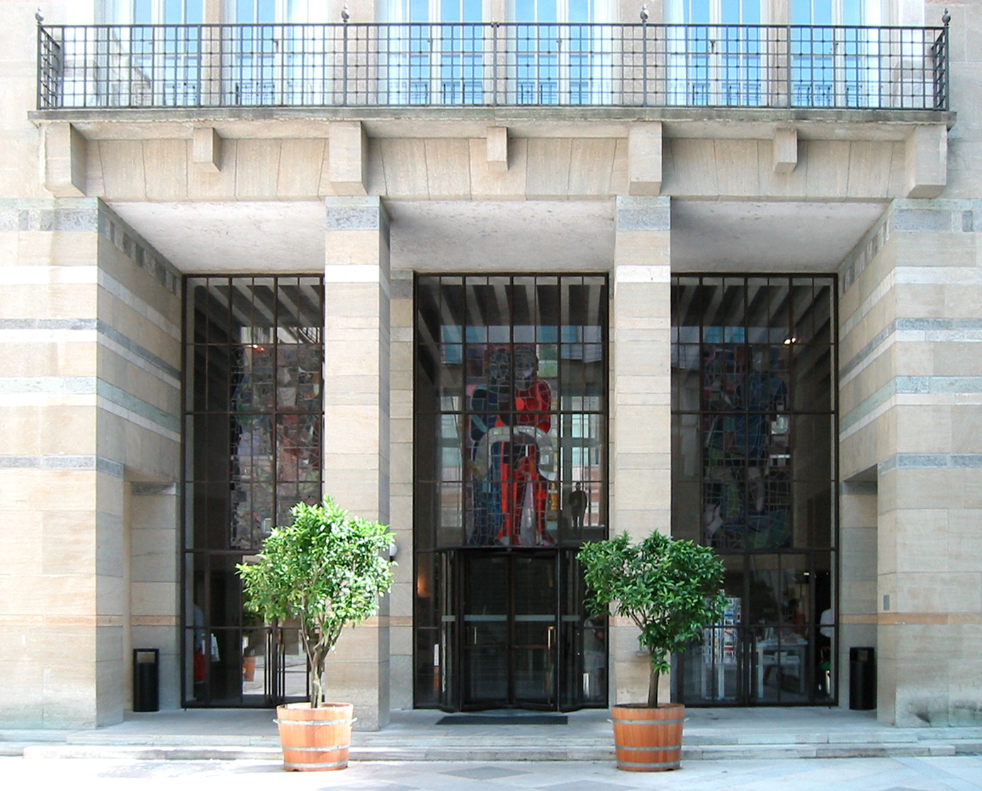 See title